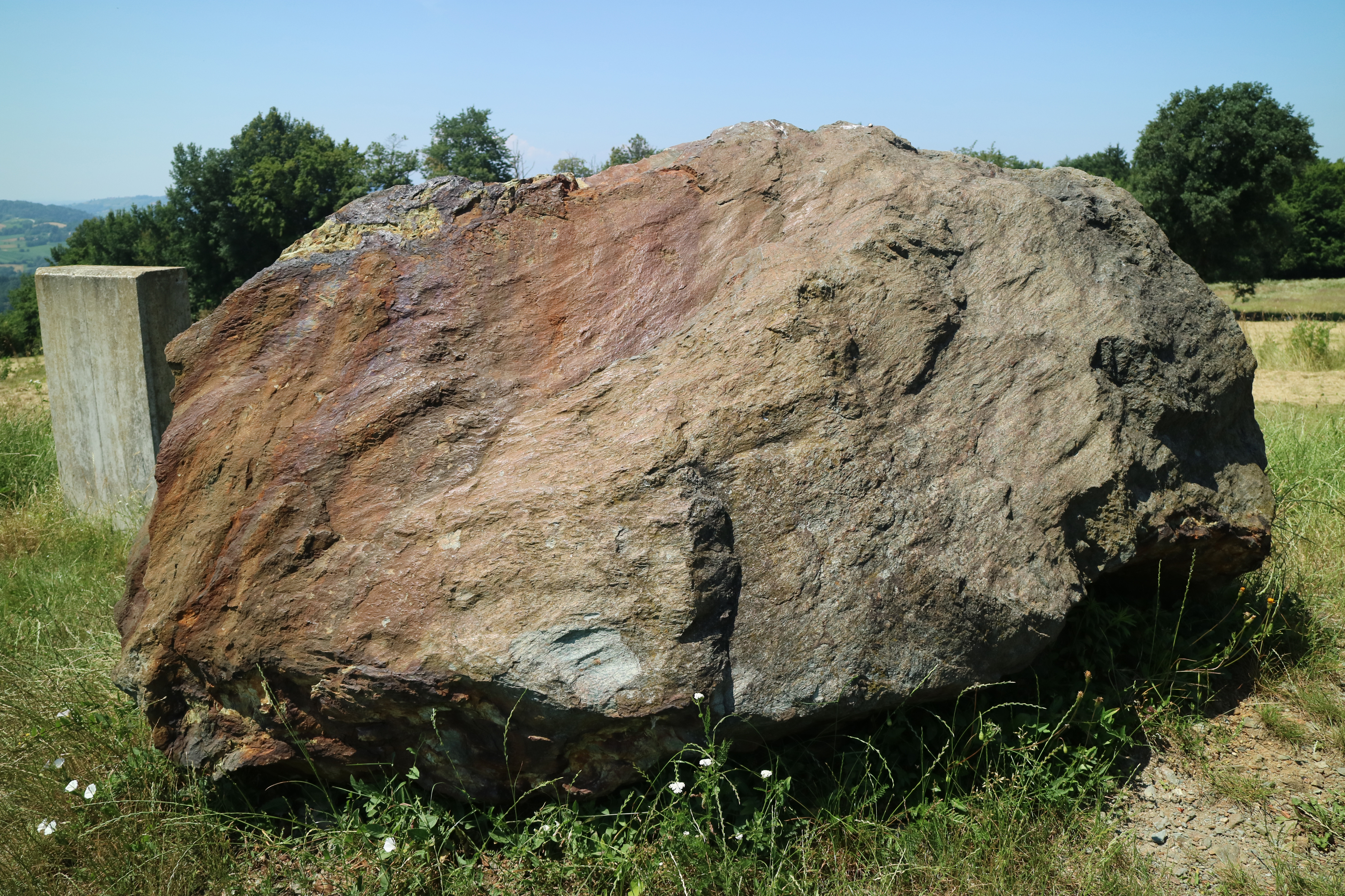 Schiefer am Sotinski breg (Stadelberg), Gemeinde Rogašovci, Slowenien